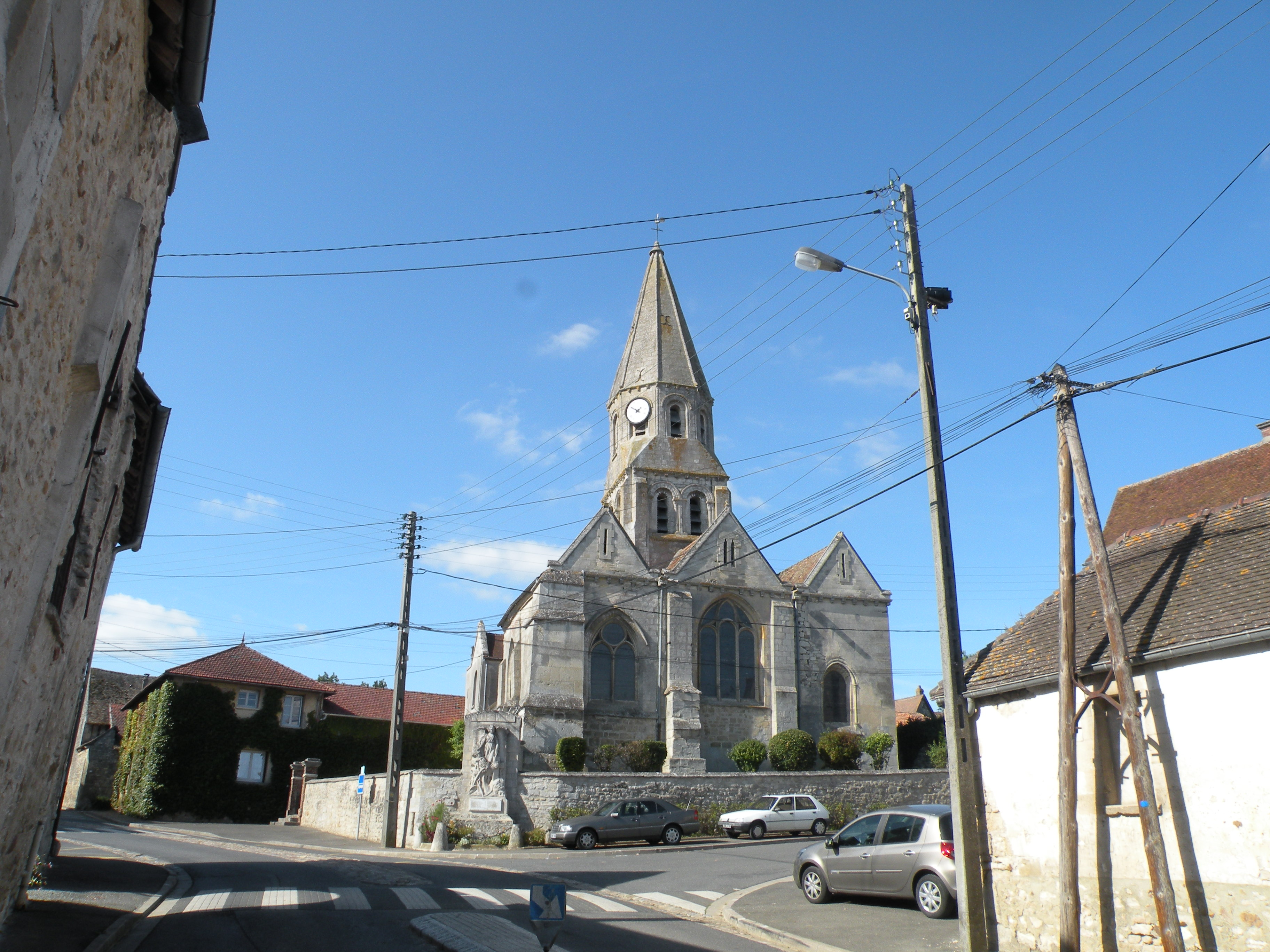 Église Saint-Étienne de Bouconvillers